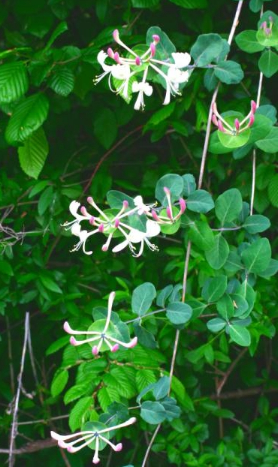 Lonicera caprifolium